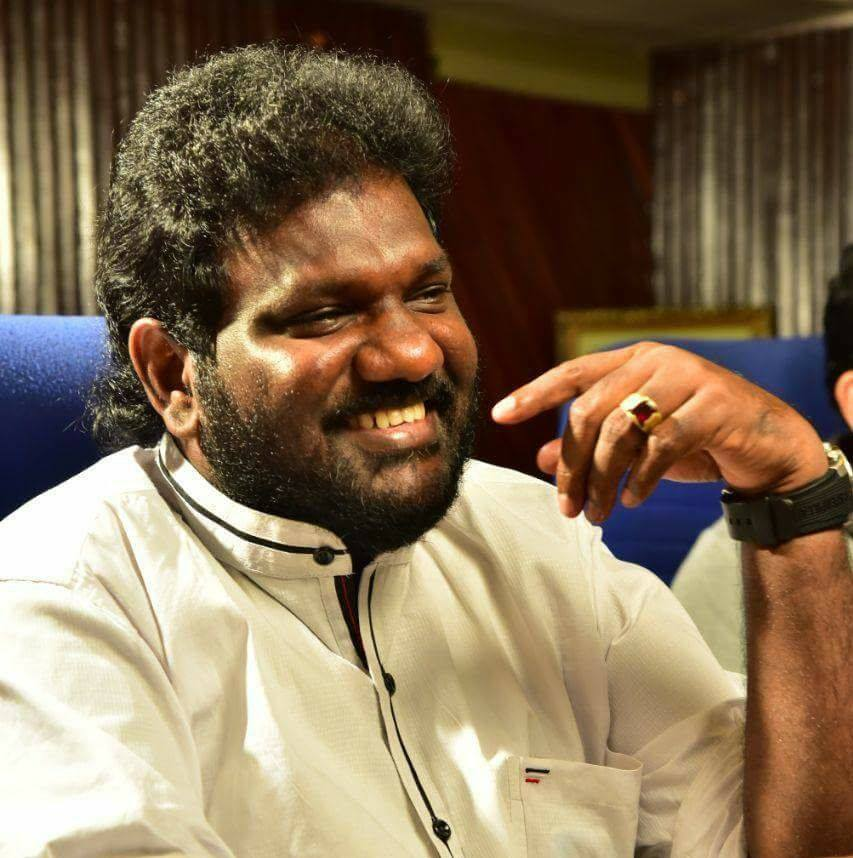 Picture of Pandalam Balan taken during a recording session of his music album.